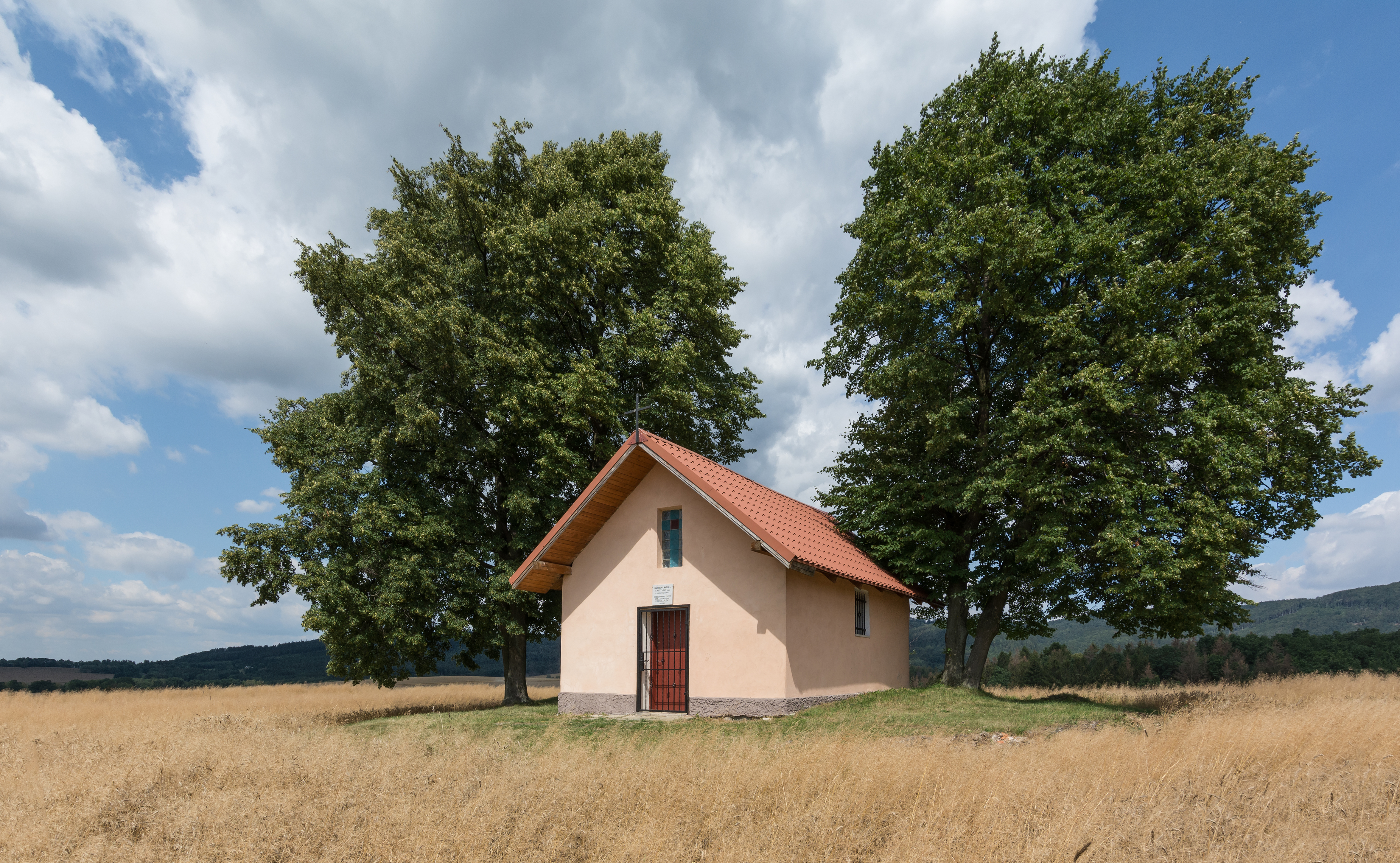 Kaplica św. Anny w Jaszkowej Górnej